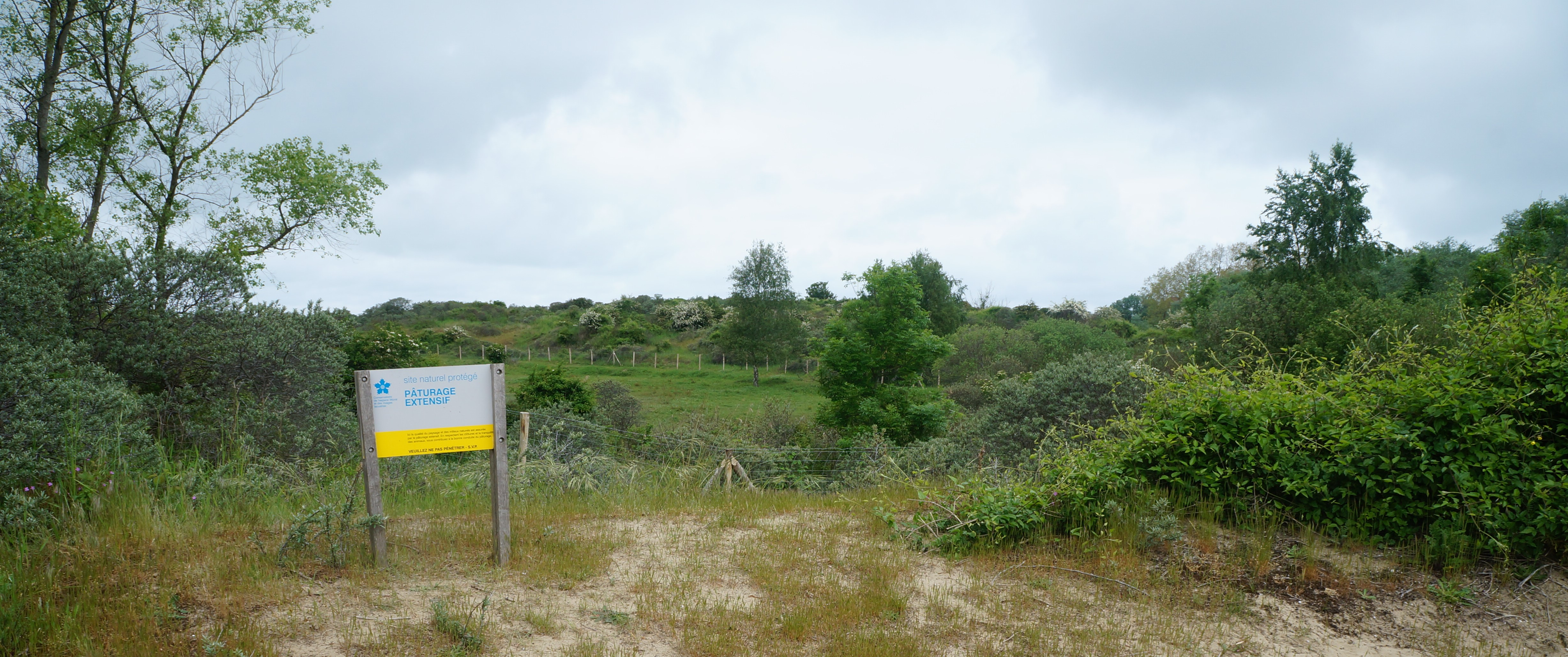 Pâturages extensifs dans la RNN de la dune Marchand Dunes de Flandres Nord-Pas-de-Calais-Picardie.- France